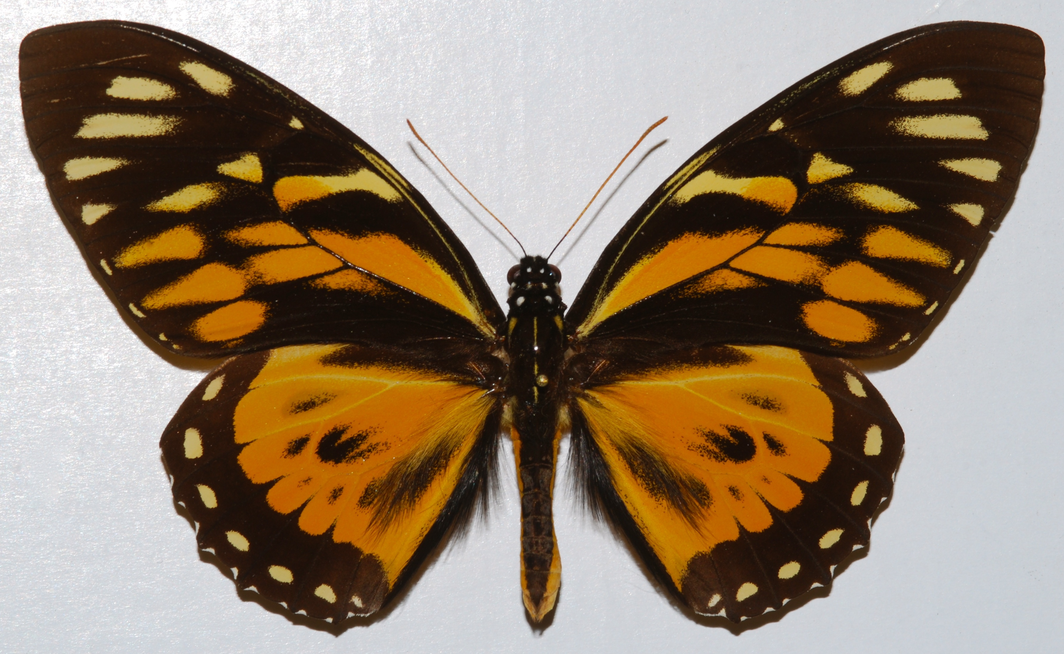 Satipo, PERU